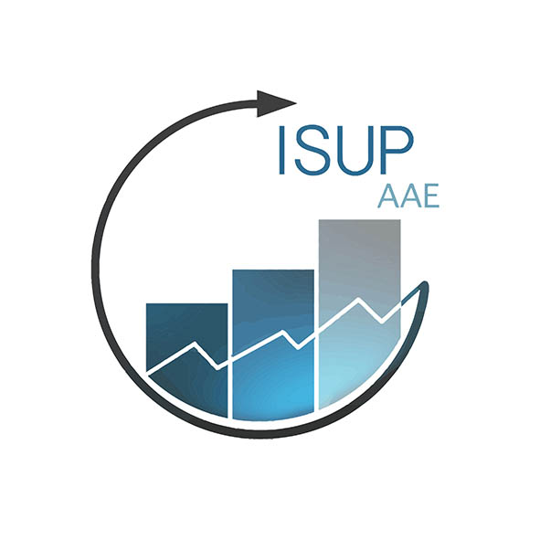 Logo AAE ISUP